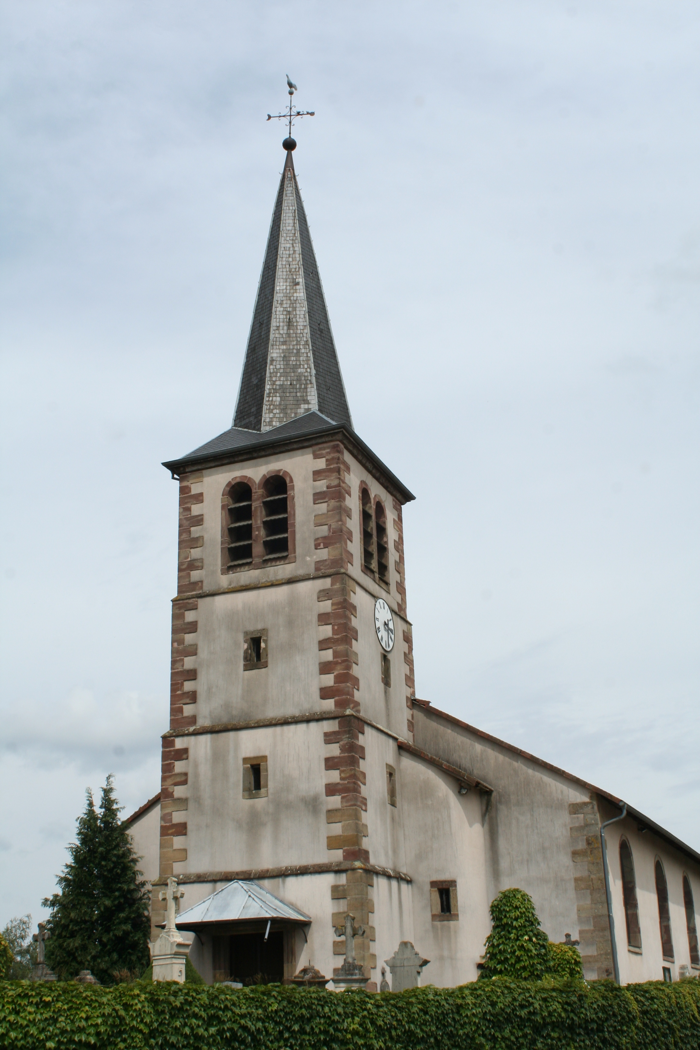 Église Saint-Remy de Roville-aux-Chênes (Vosges)